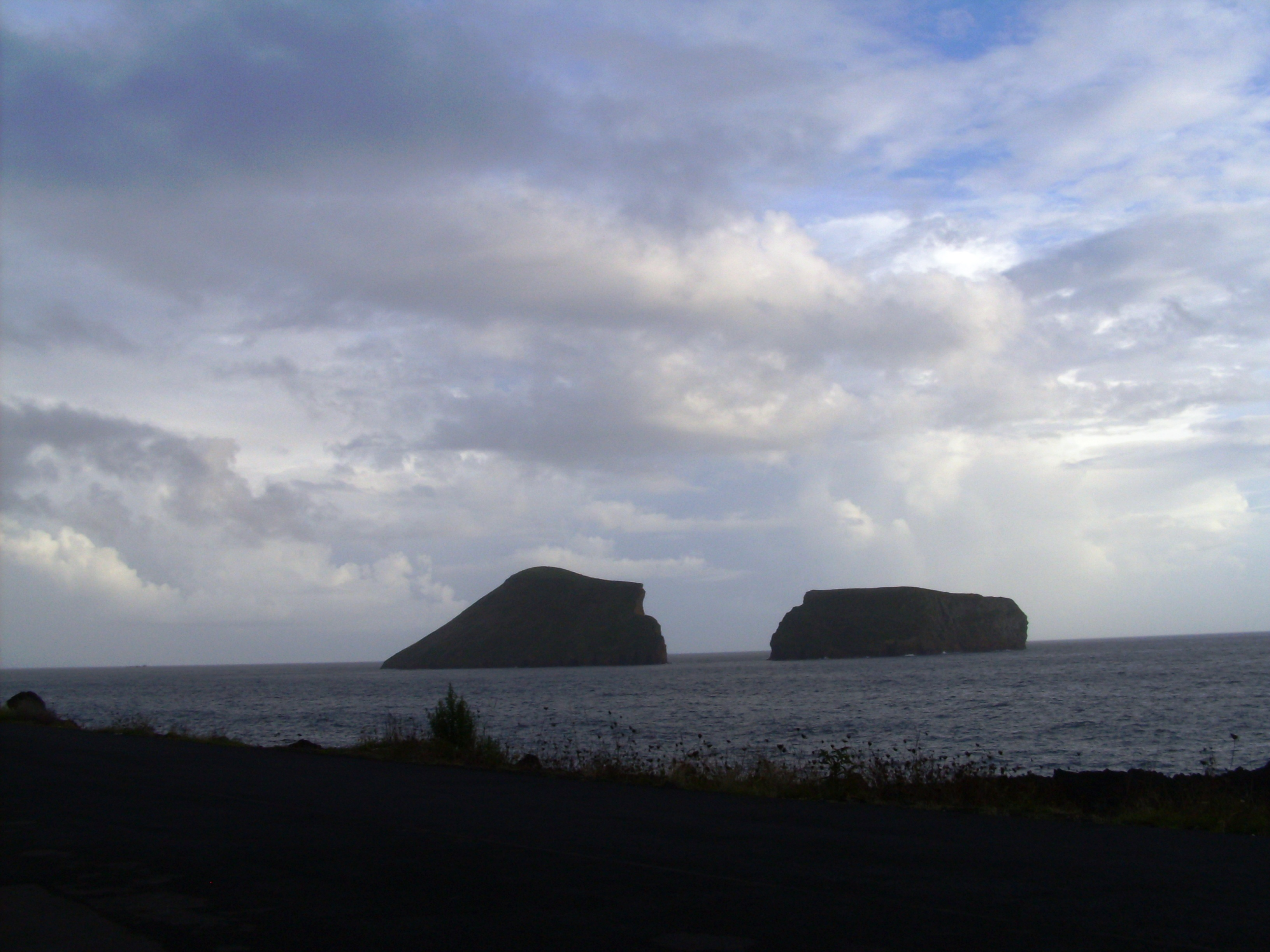 Ilhéus das Cabras, freguesia de Porto Judeu, ilha Terceira, Açores.